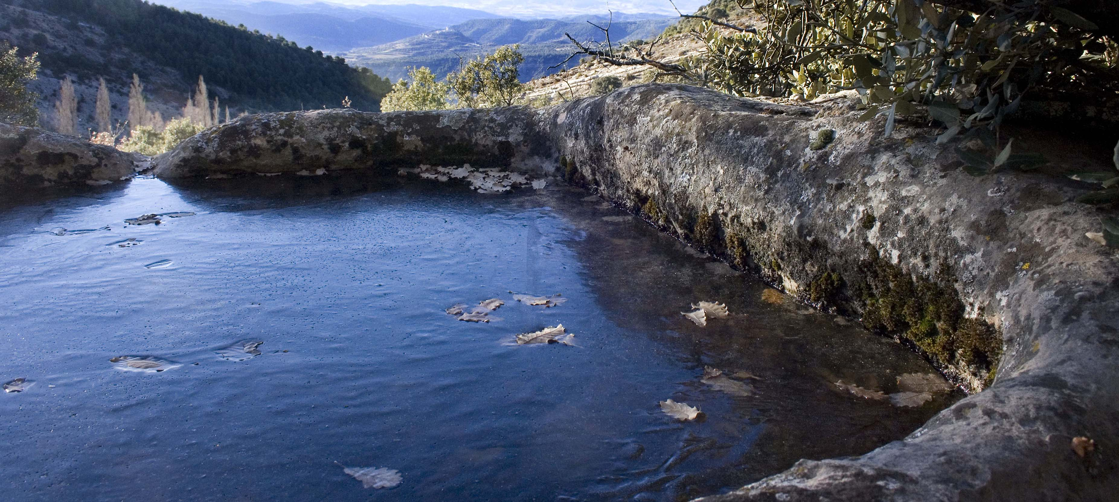 Trull o cup de vi, situat a Rin de la Carrasca, municipi d'Isàvena, a la Baixa Ribagorça d'Aragó. Darrere del cup es veu Roda d'Isàvena.